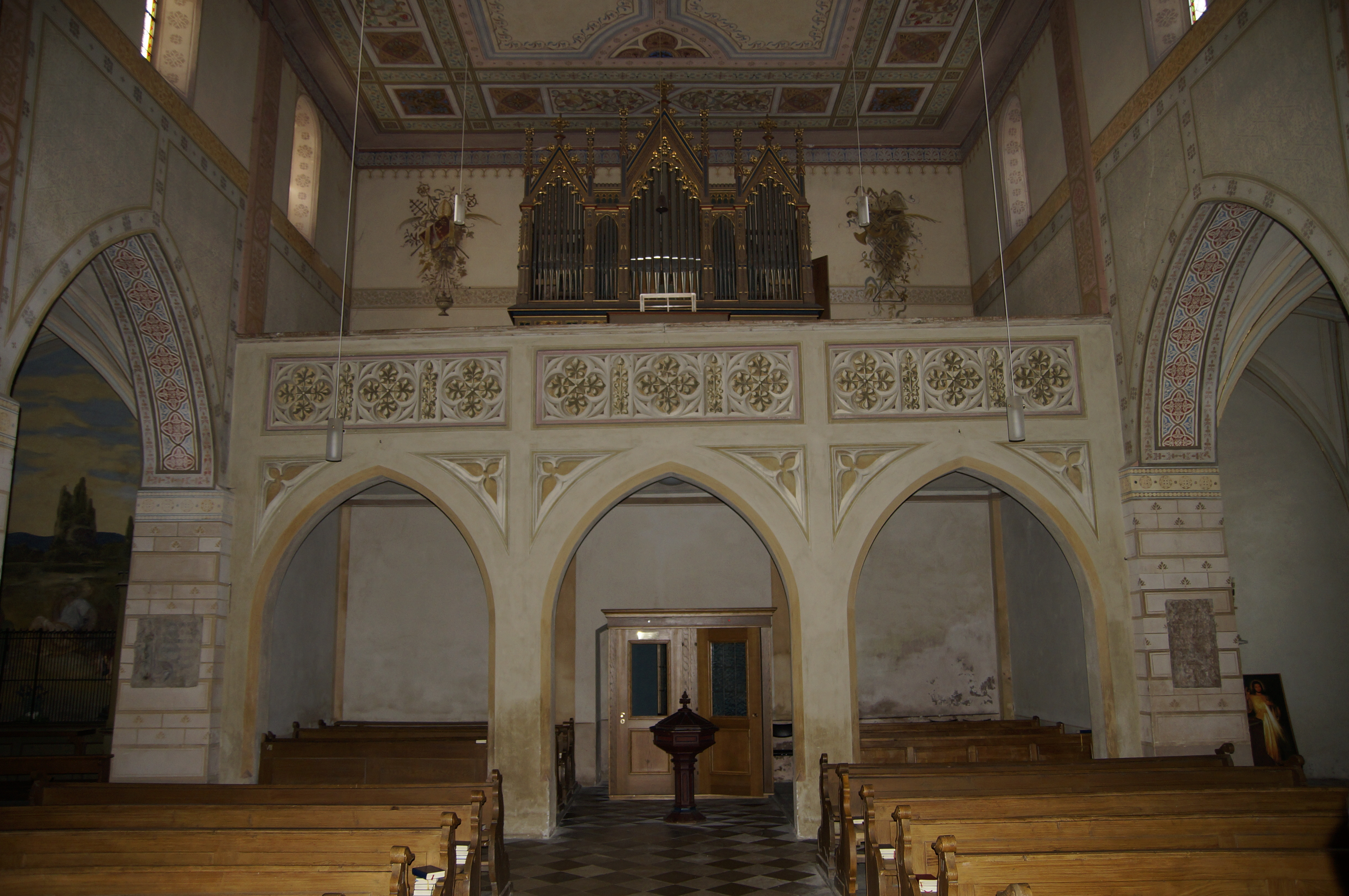 Orgelempore der neugotisch eingerichteten Kirche St. Johannes in Moosburg an der Isar